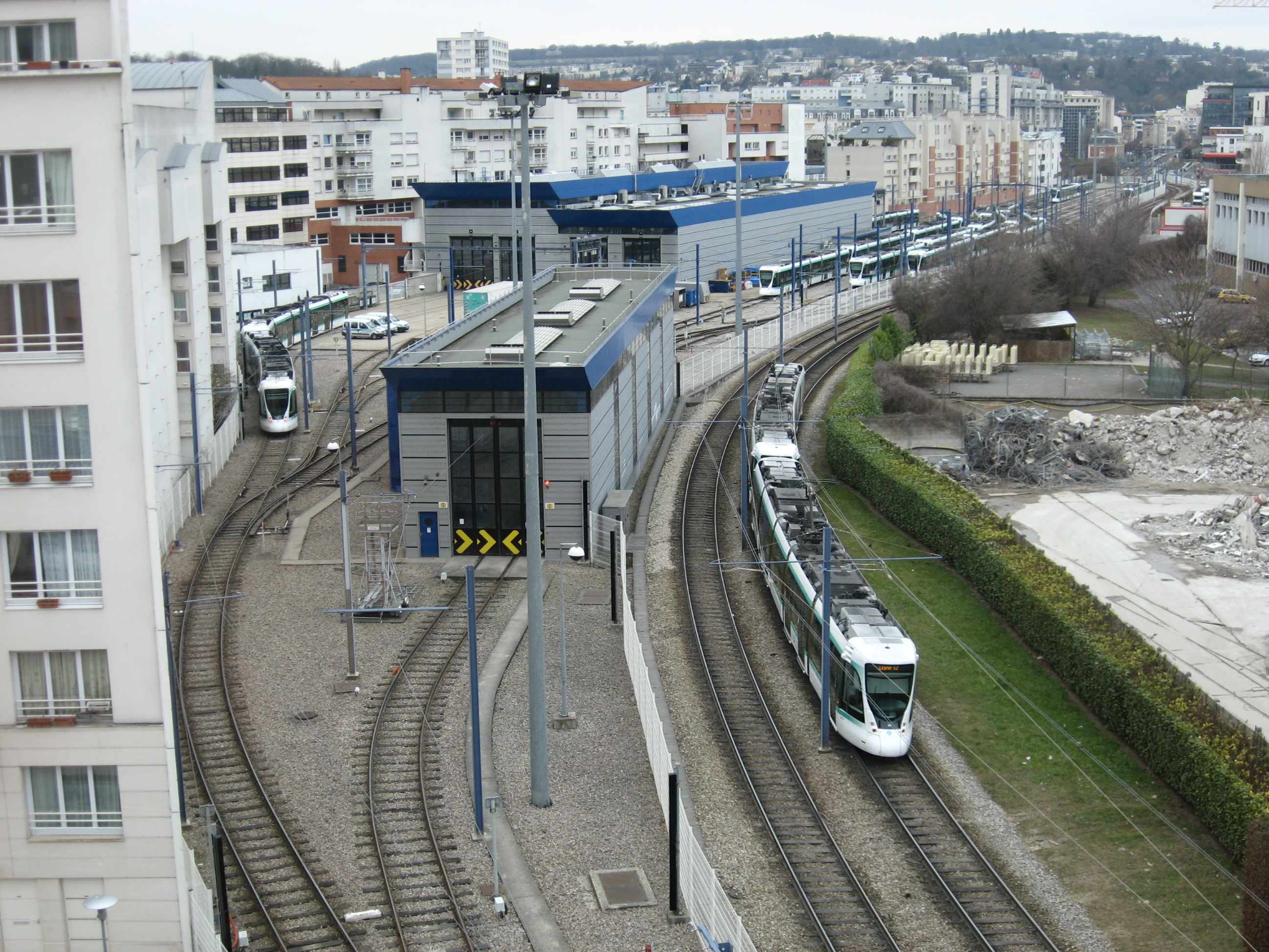 Stel- en werkplaats van de tramlijn T2, Issy-les-Mouilineaux, Hauts-de-Seine, Frankrijk